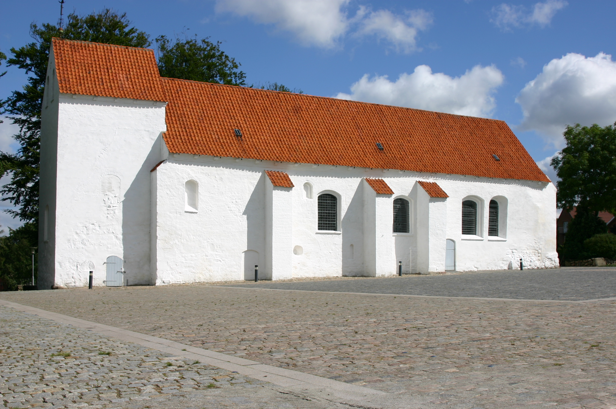 Asmild kirke, Viborg Stift